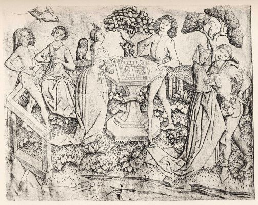 Großer Liebesgarten mit Schachspielern L. 214 Berlin, Kupferstichkabinett